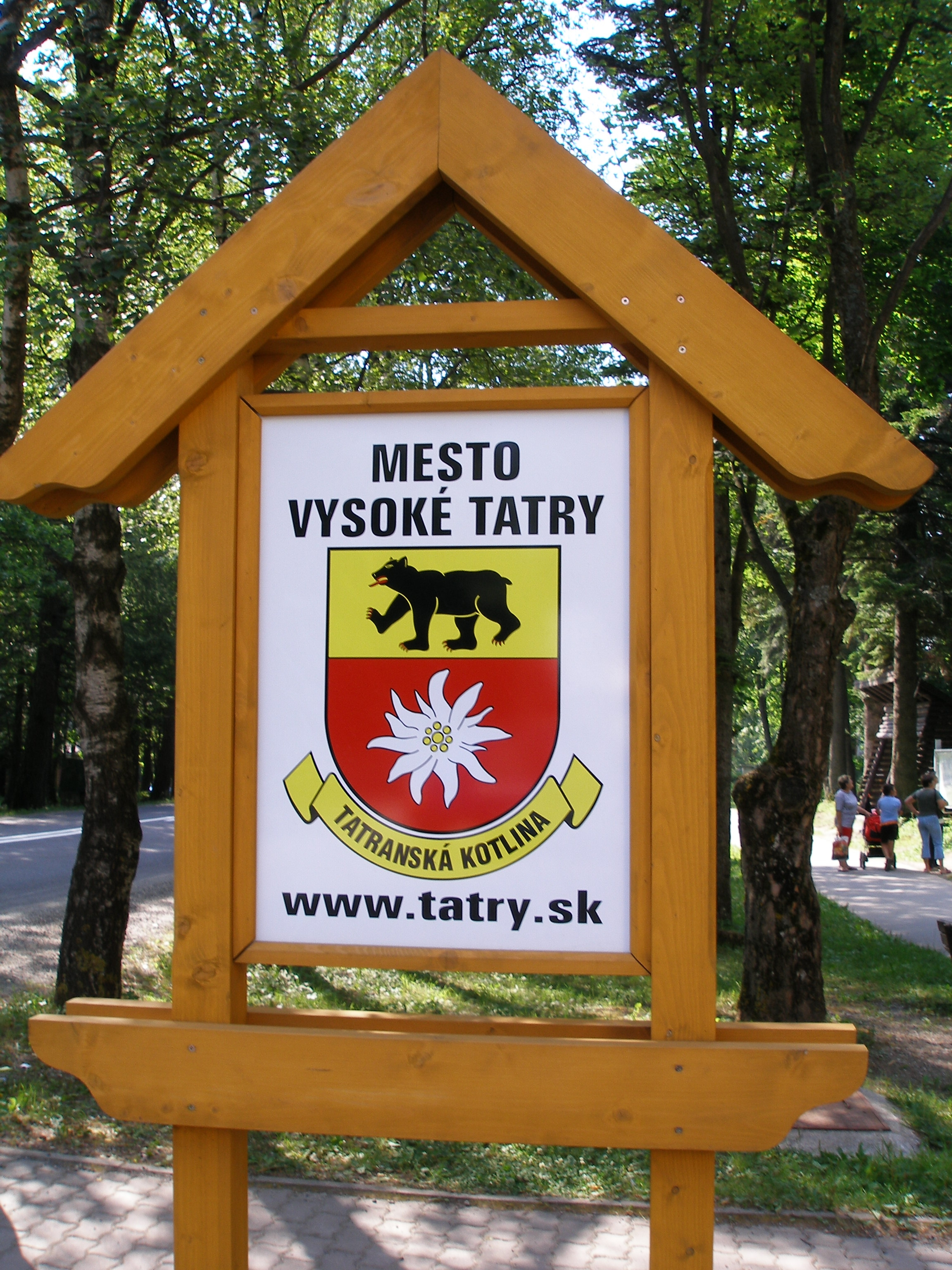 Osada Tatranská Kotlina, Slovakia